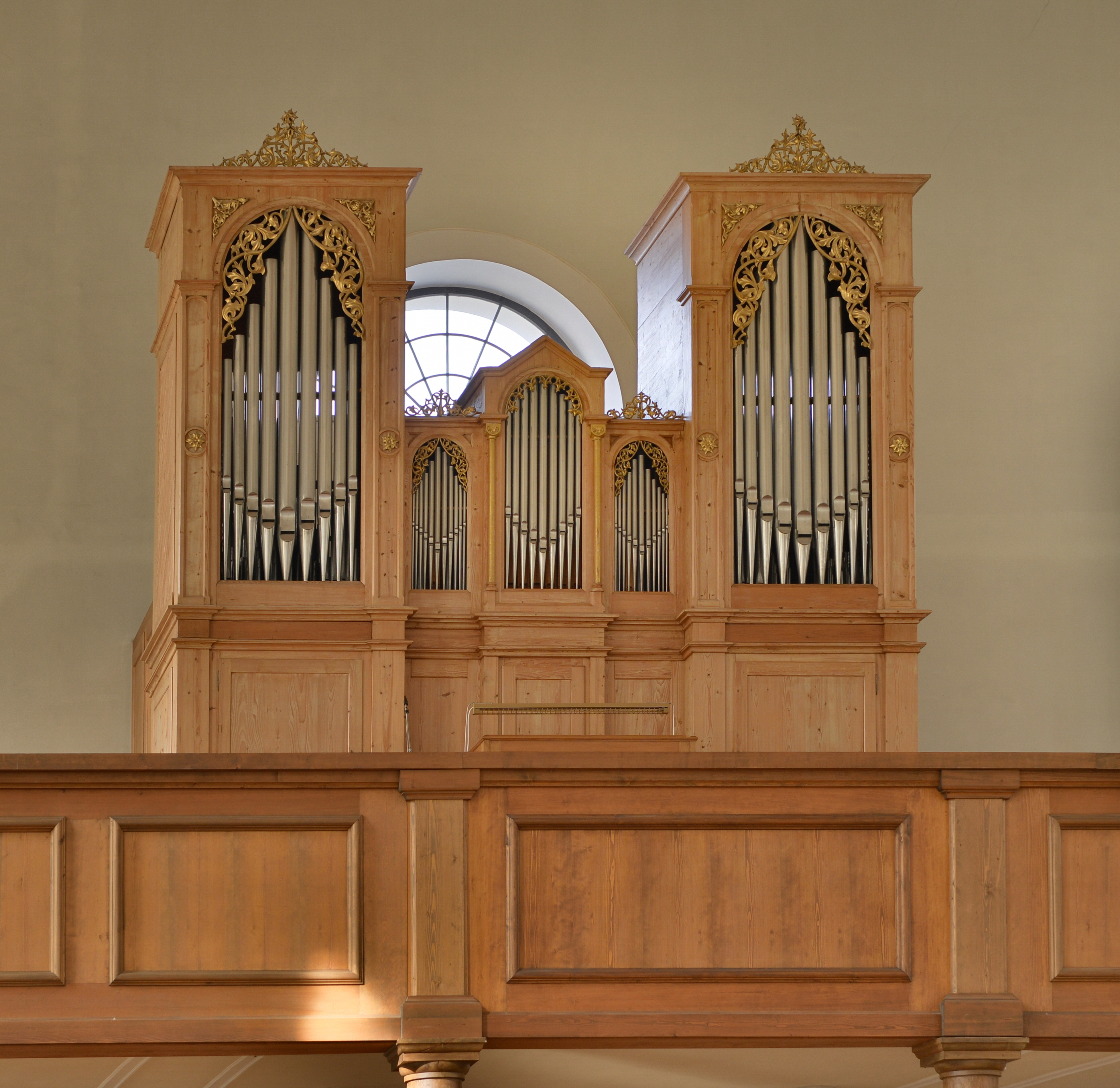 die Pfarrkirche hl. Drei Könige von Hittisau in Vorarlberg.